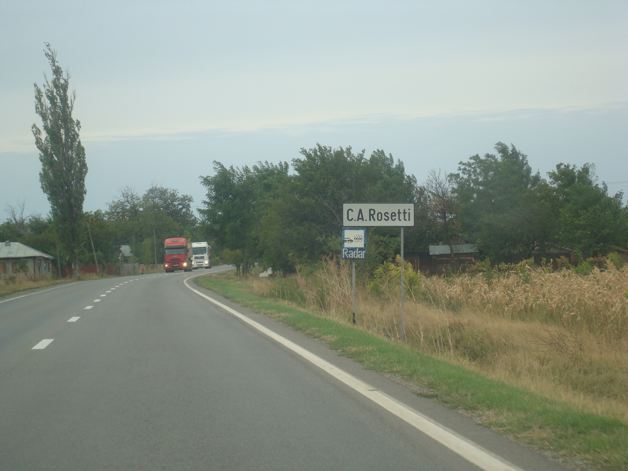 C.A. Rosetti, Tulcea